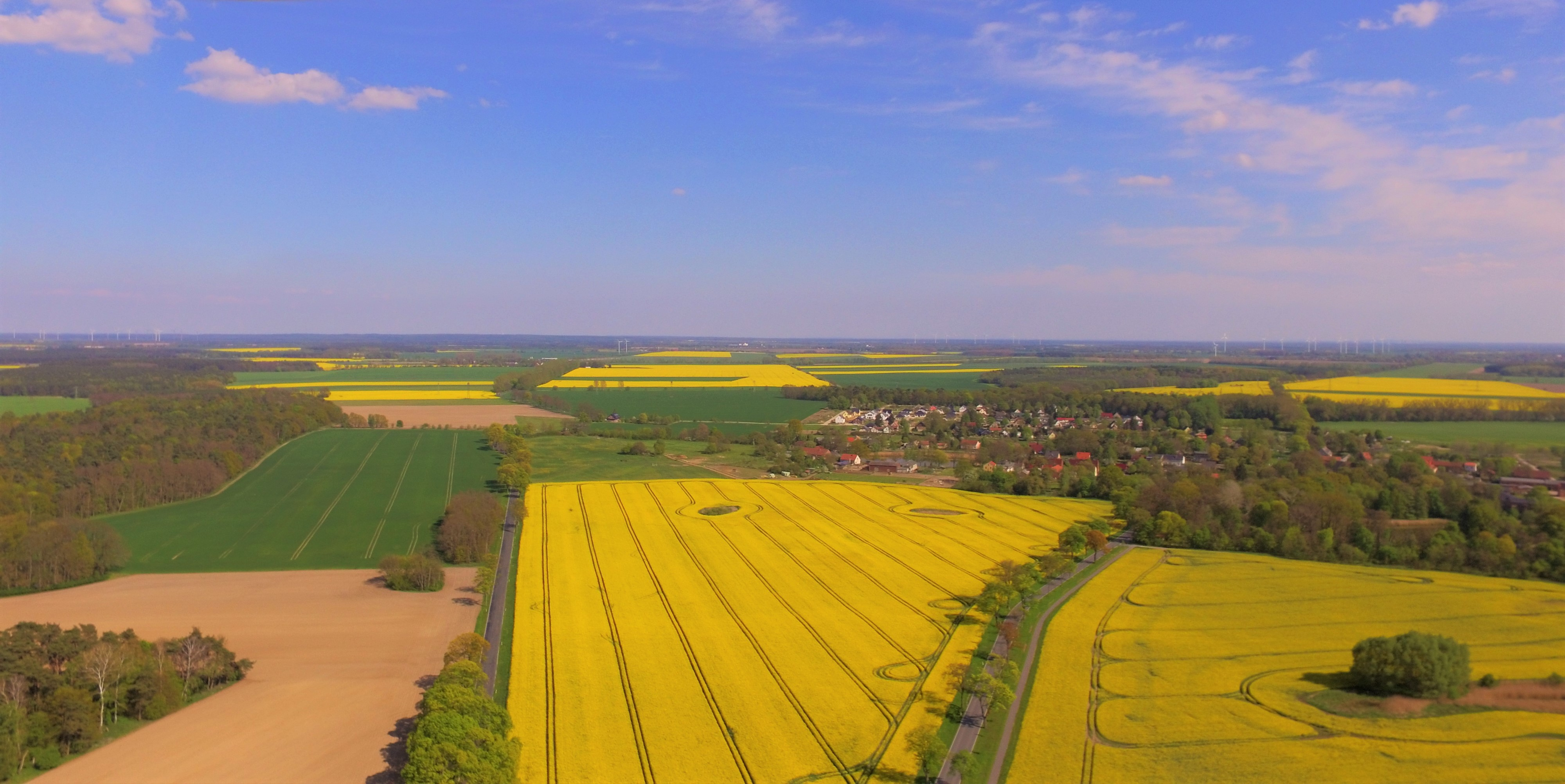 Rapsfeld vor Bernau nahe Börnicke